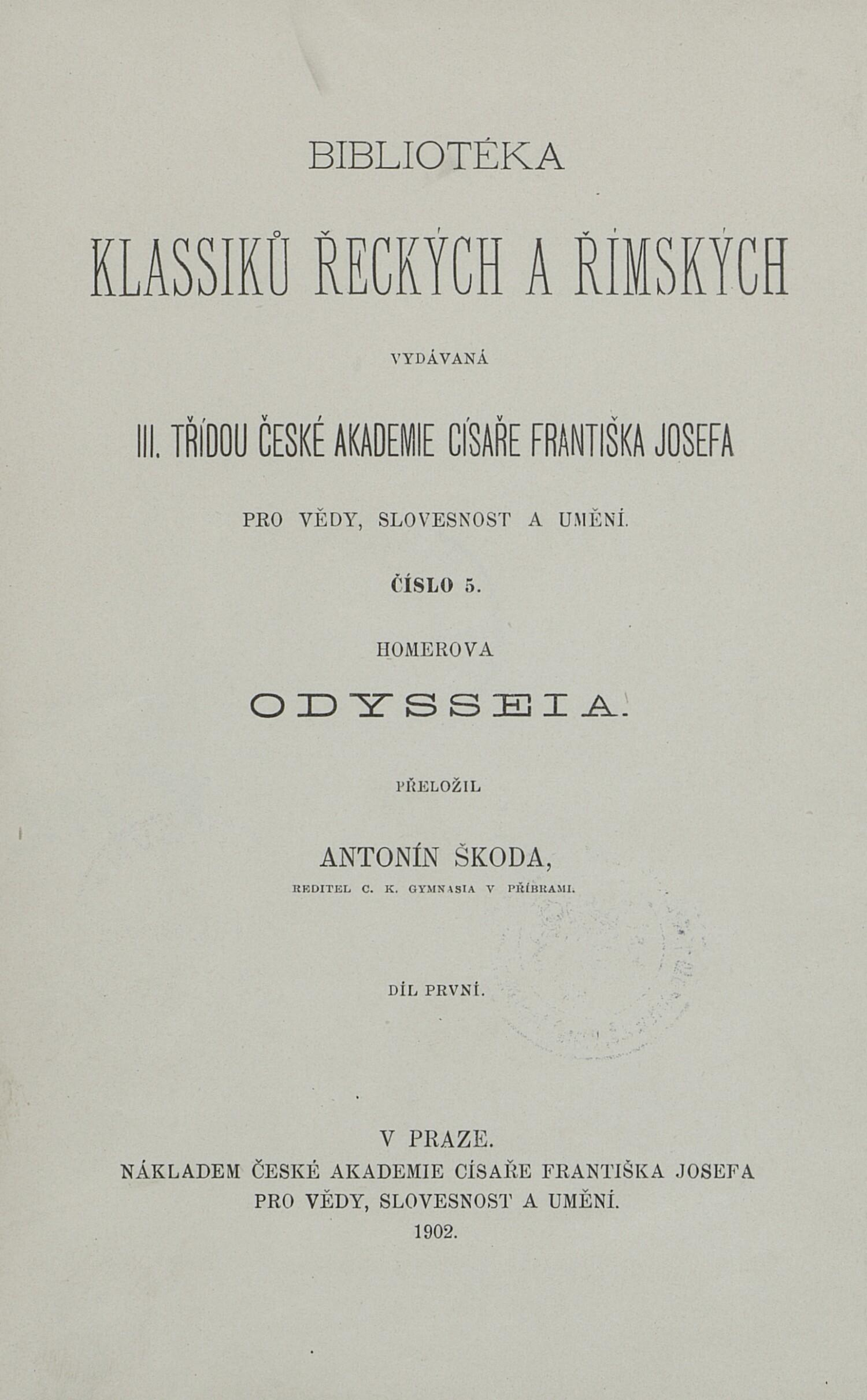 Odysseia, Czech translation Antonín Škoda, 1902